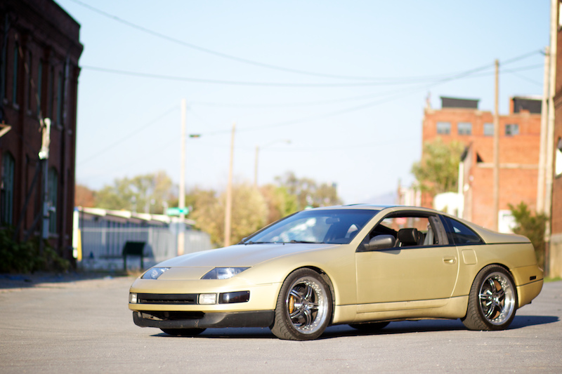 James' 300zx.